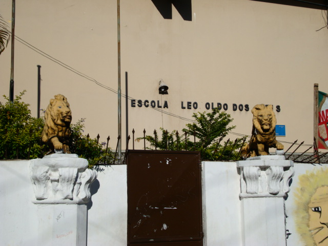 Escola Estadual Leopoldo dos Reis, Salvador, Bahia, Brasil.